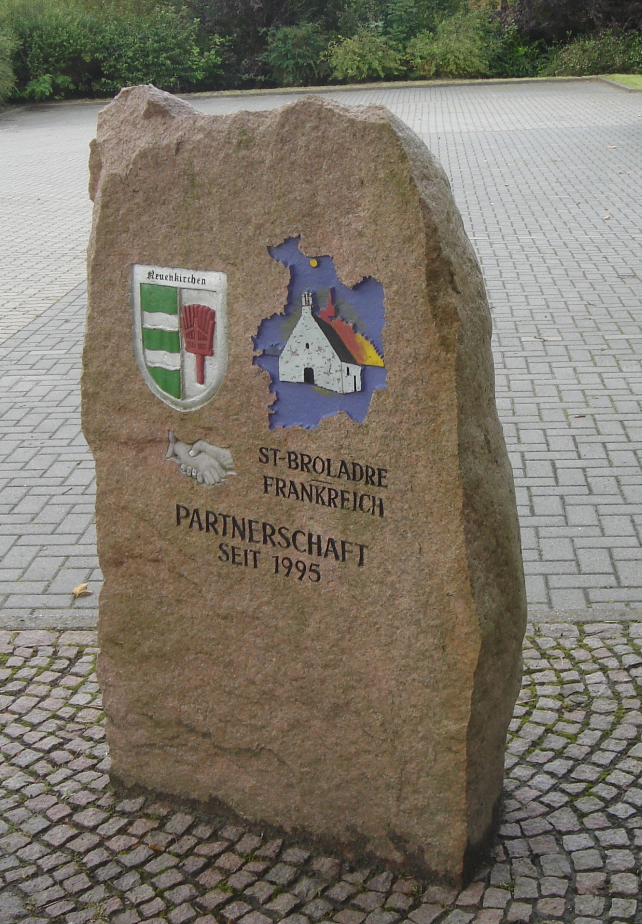 Denkmal Gemeindepartnerschaft zwischen Neuenkirchen (Land Hadeln) und St. Broladre